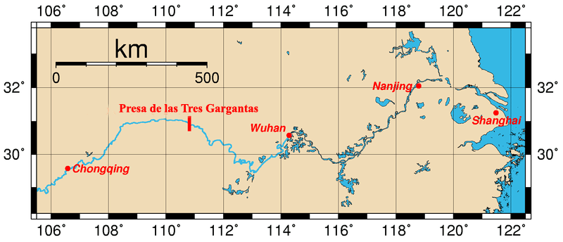 Mapa de la presa de las tres gargantas en español